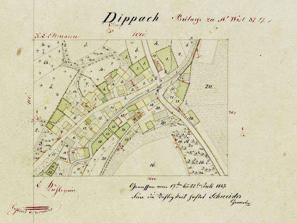 Alte Karte von Dippach bei Eltmann aus dem Jahr 1847